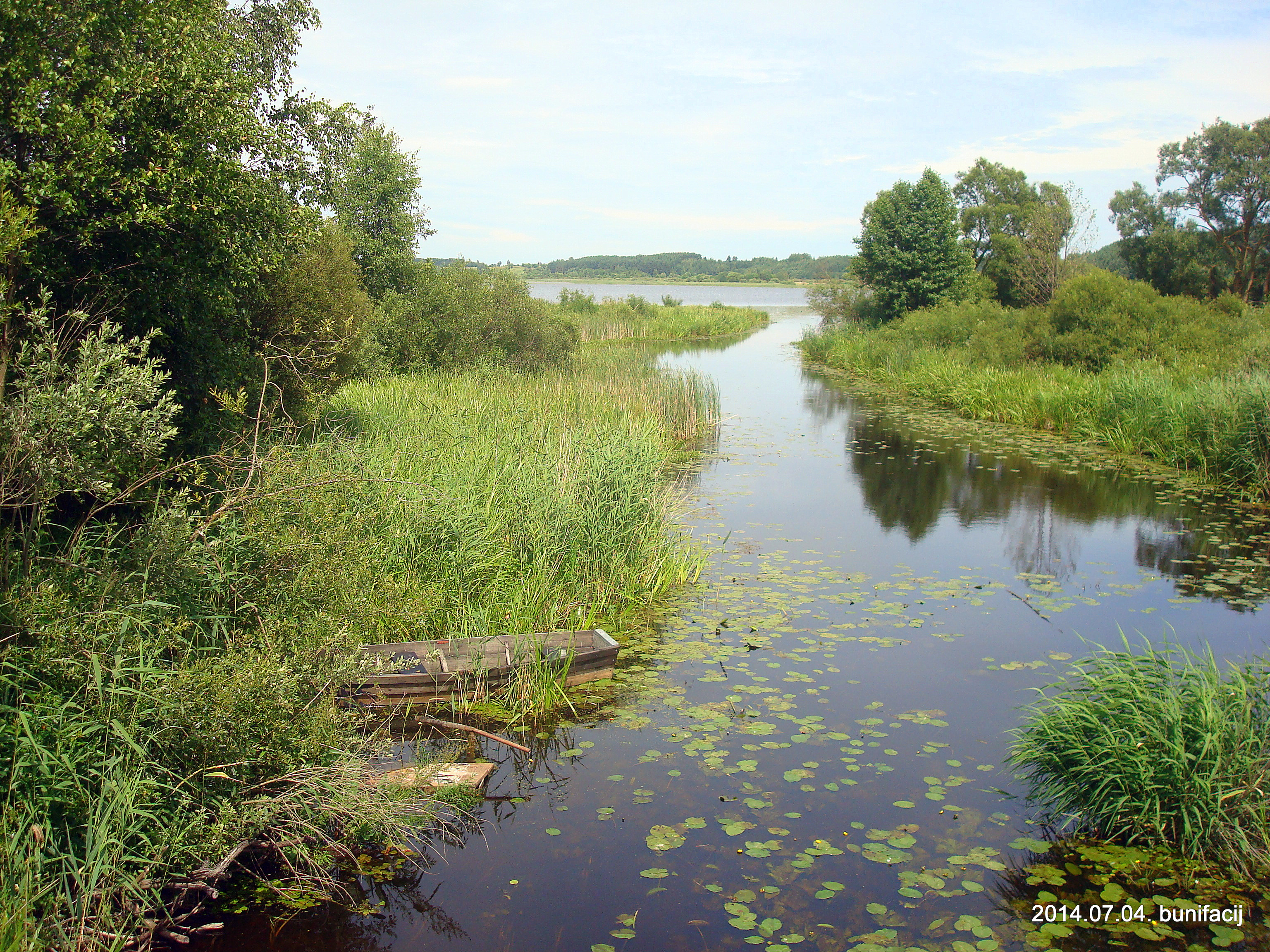 Река и озеро